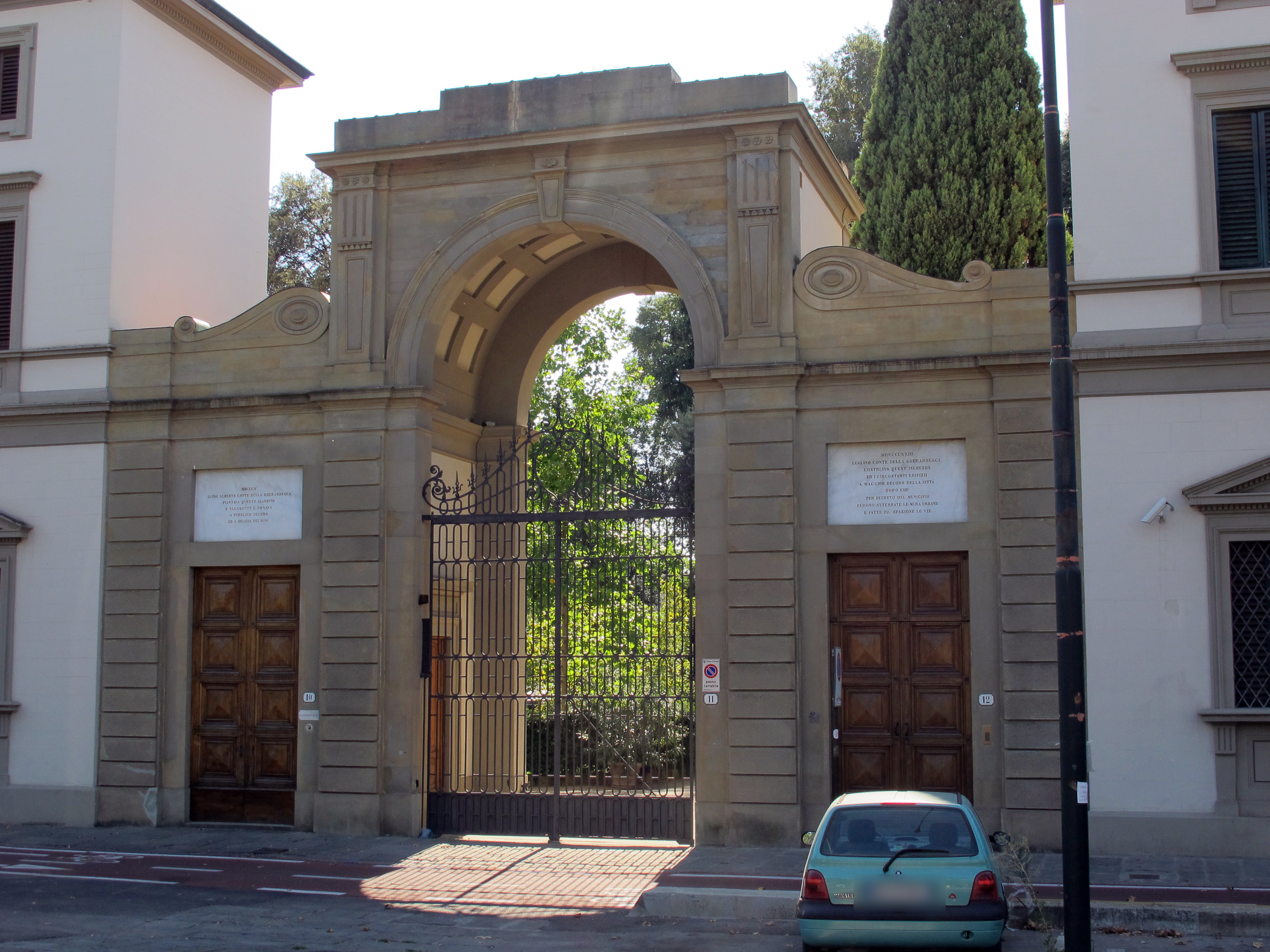 Piazzale Donatello, Firenze